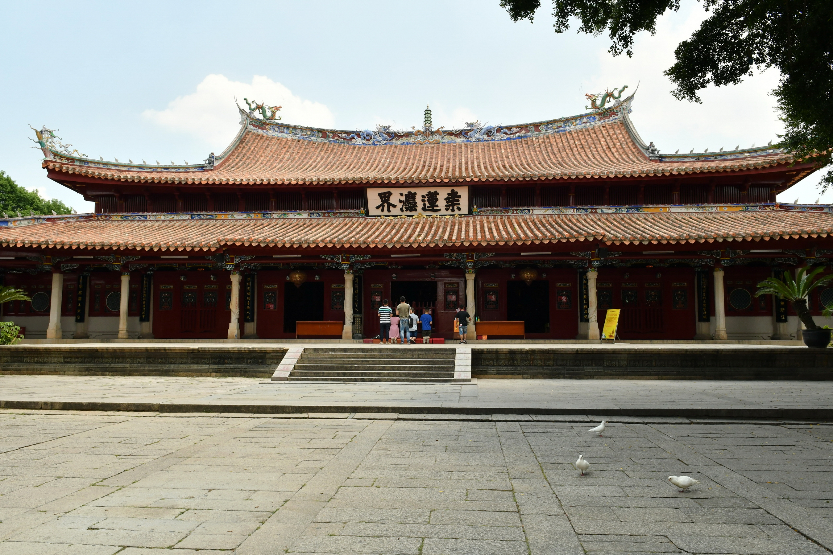 泉州开元寺大雄宝殿，也称紫云大殿。屋顶重檐歇山式，殿外挂"桑莲法界"榜书匾额。